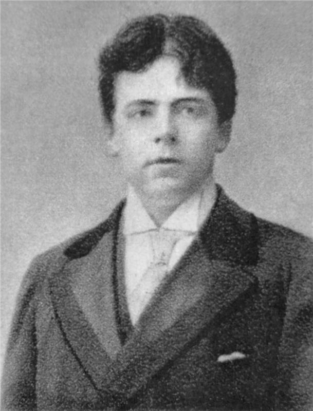 Vladimír Šamberk (1869 - 1930), Český herec a malíř.